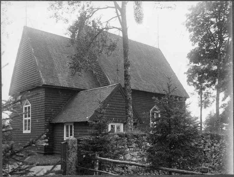 Kyrkan mot nordöst. Kategori: (01) ExteriörerKyrkan mot nordöst.